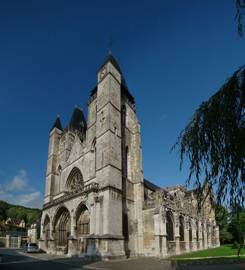 Collégiale Notre-Dame, Les Andelys, Eure, Normandie, France.